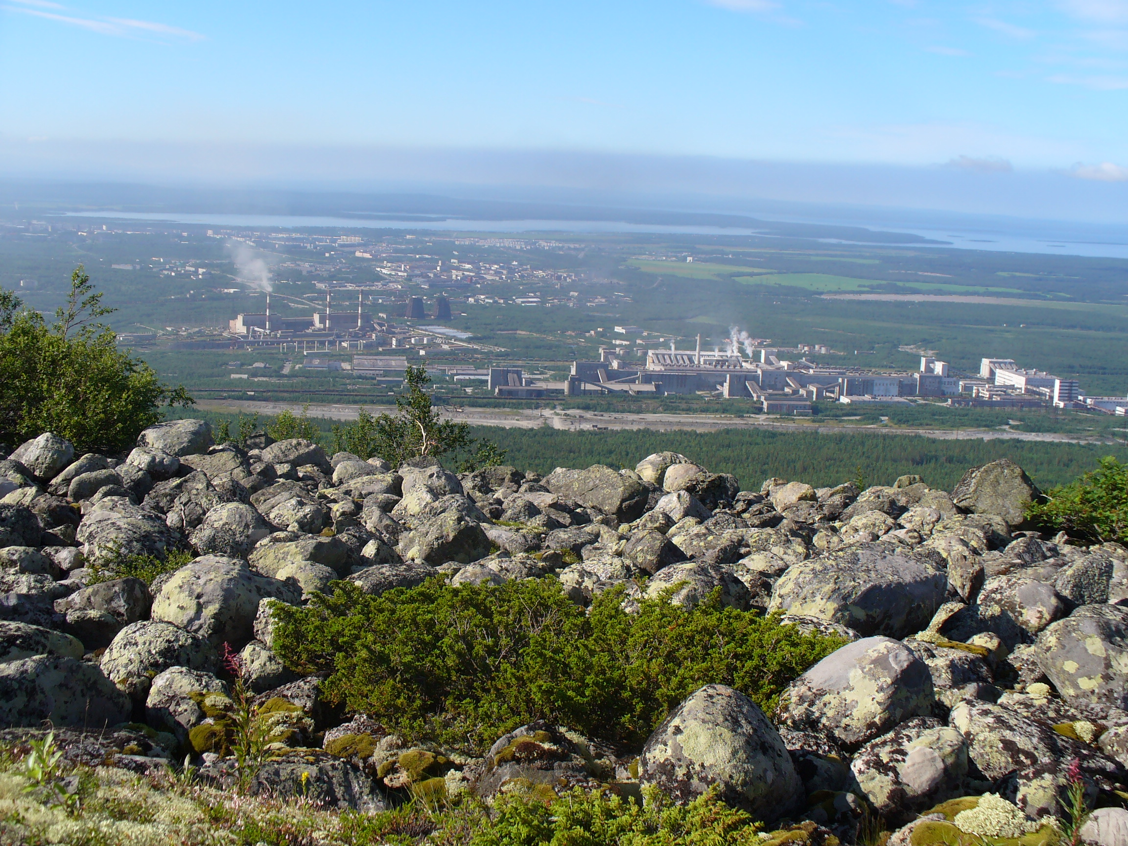 Apatyty widziane z Chibin